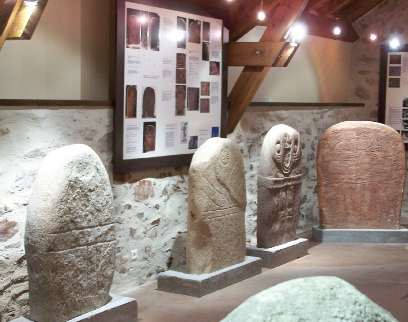 Centre d'Interprétation des Statues-Menhirs